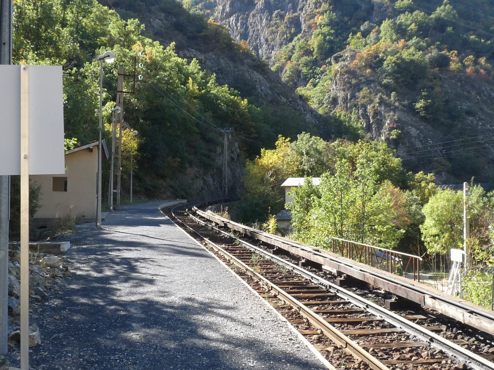 Gare de Thuès-Carança, Pyrénées-Orientales, France